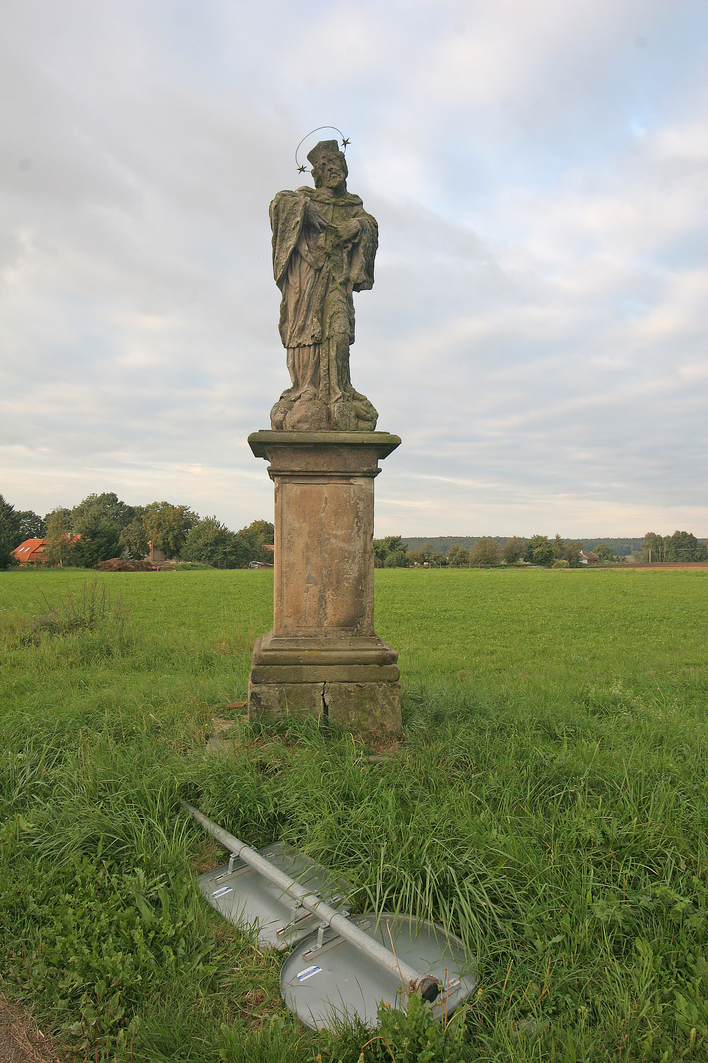 Socha sv. Jana Nepomuckého (Osičky), směr Osice - Dobřenice, Osičky